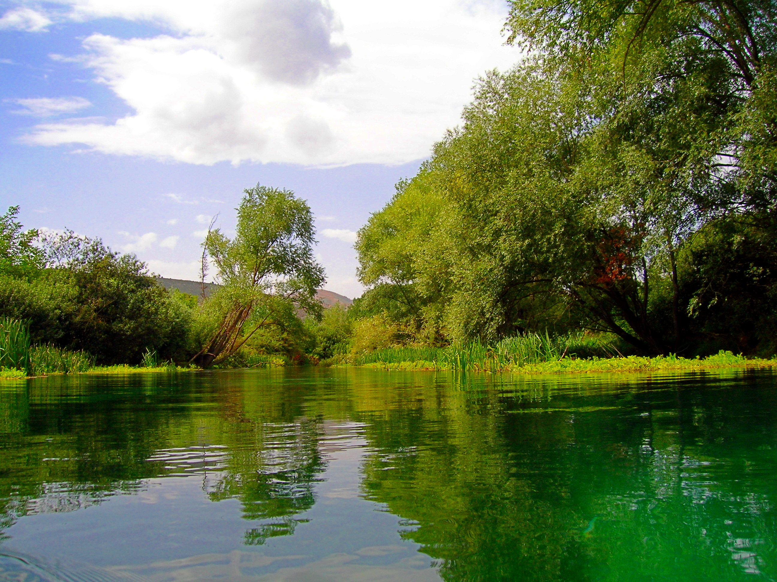 Fiume Tirino - San Martino, Capestrano (AQ)